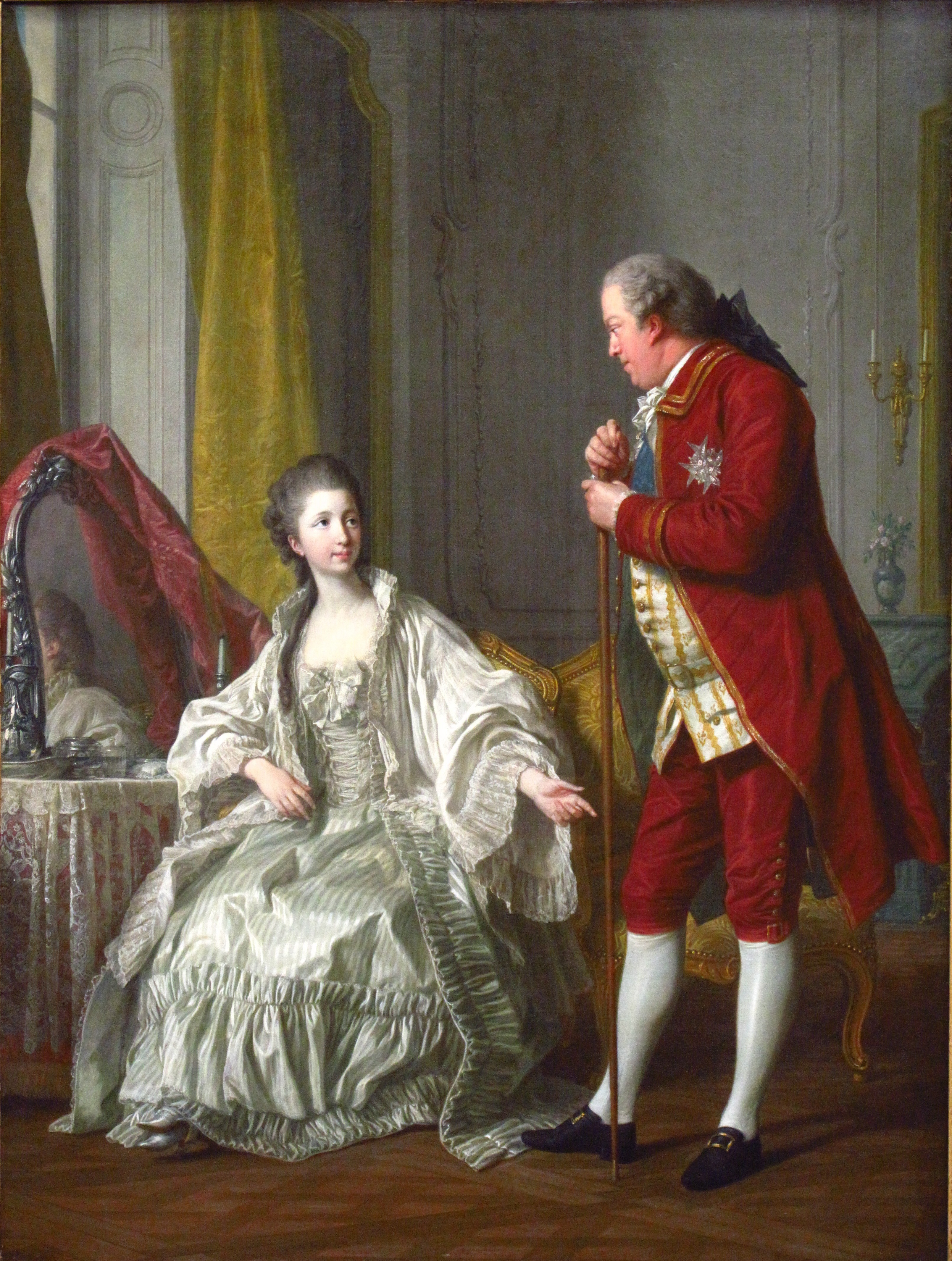 Frère cadet de la marquise de Pompadour, Marigny (1721-1781) fut le directeur des Bâtiments de Louis XV de 1751 à 1773. Il est représenté avec sa jeune épouse de dix-huit ans, née Marie-Françoise Constance Julie Filleul (1751 - 1822), deux années après leur mariage.